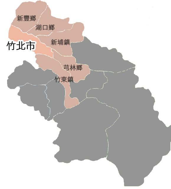 竹北市相對位置。